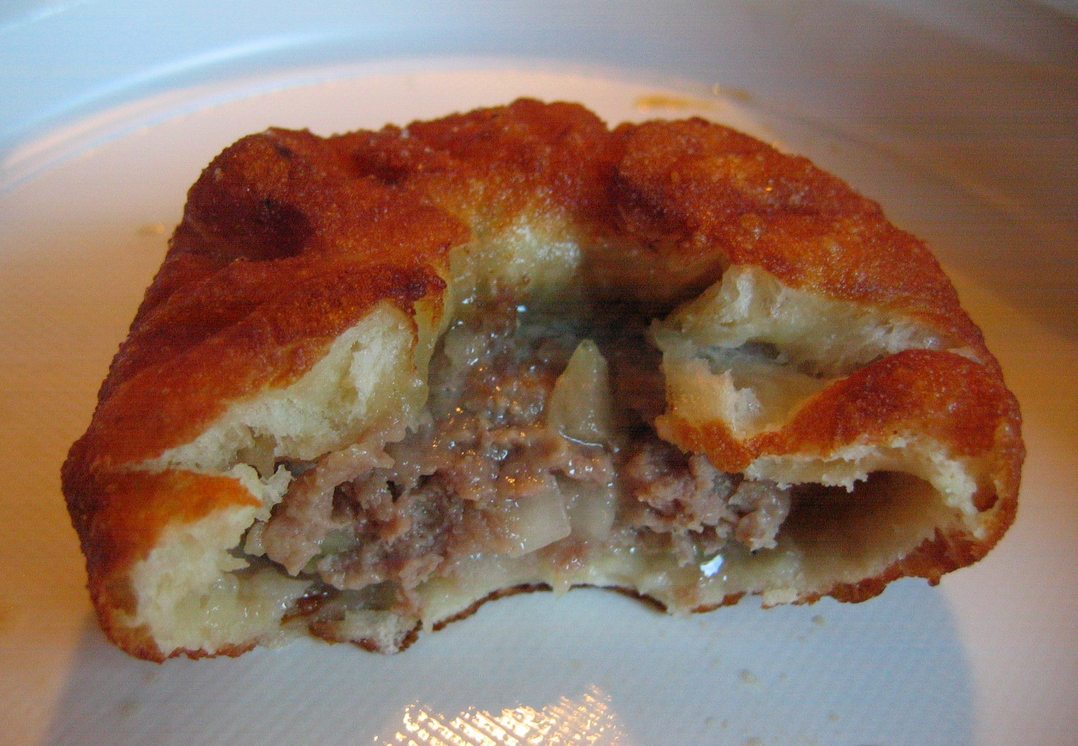 belyash